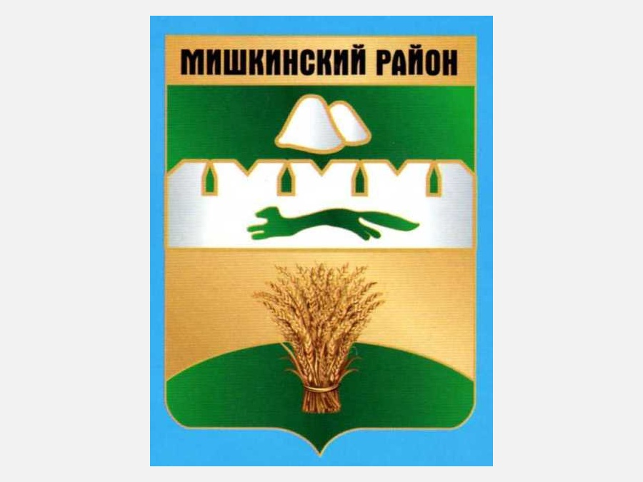 Герб Мишкинского района (Курганская область) в 2009 году